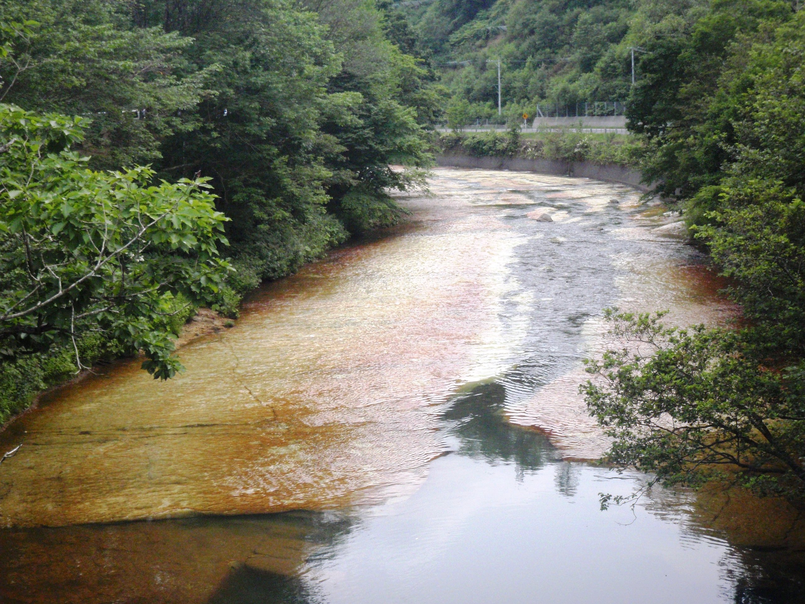 北湯沢温泉街を流れる長流川、白絹の床。